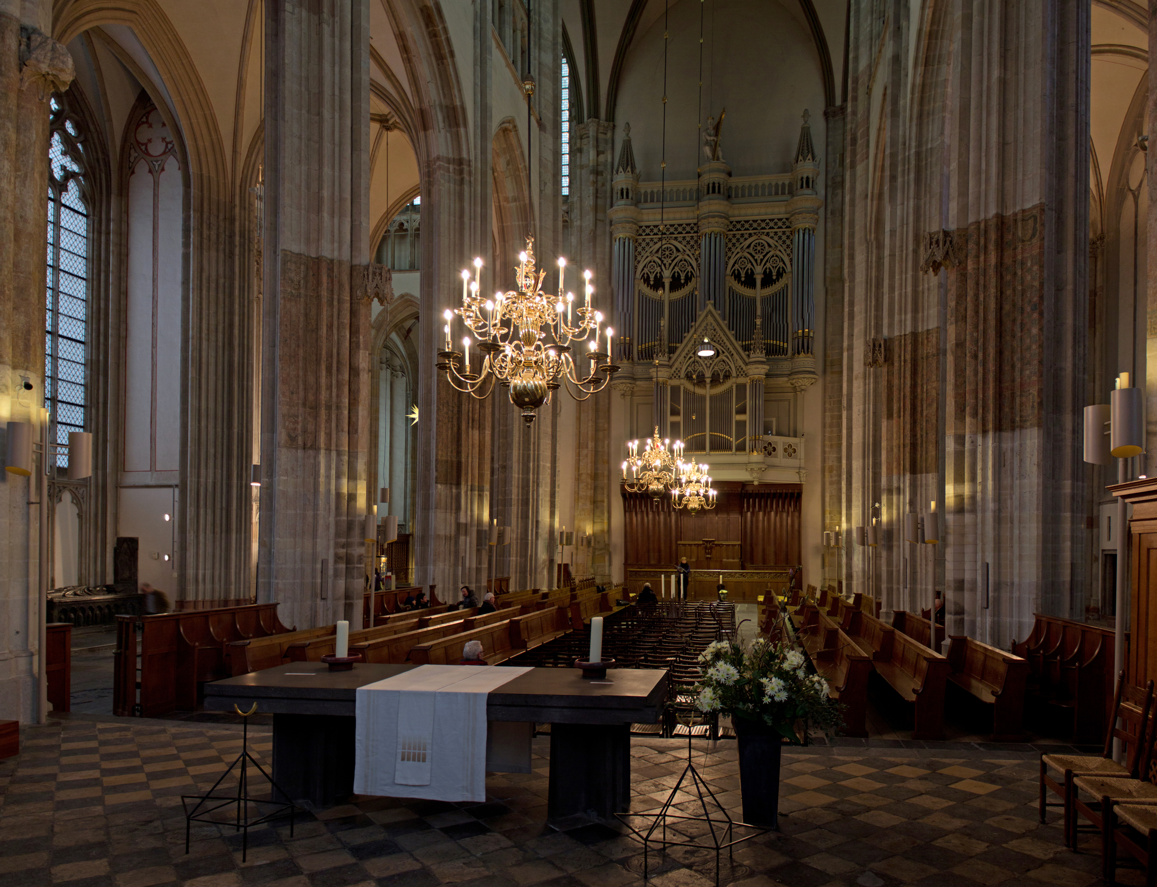 Interieur van de Domkerk, Utrecht.